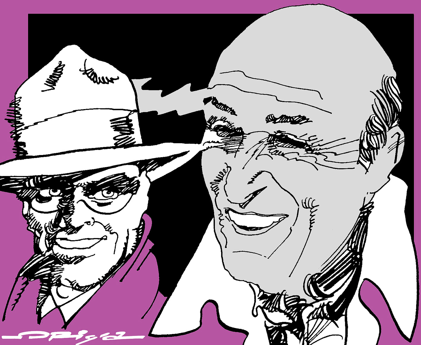 Will Eisner, Cartoonist americano (1917-2005). Ritratto a china di Graziano Origa